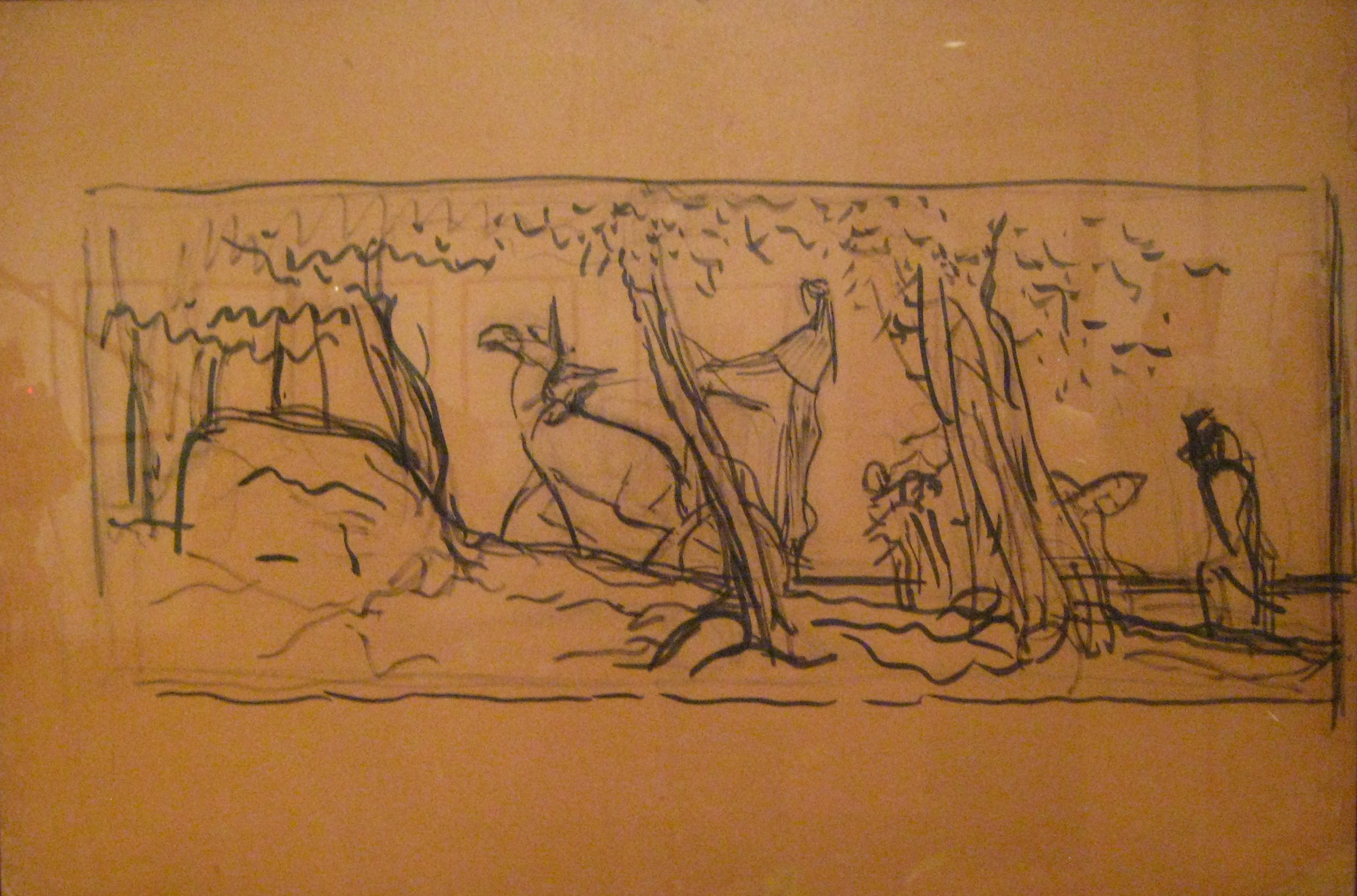 Одиссей и Навсикая